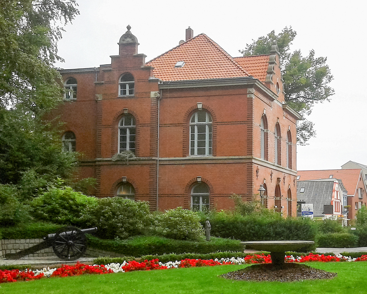 Künstlerhaus (altes Amtsgericht, Anno 1892) im Schlossgarten von Schloss Ritzebüttel (Cuxhaven), Baudenkmal seit 1983